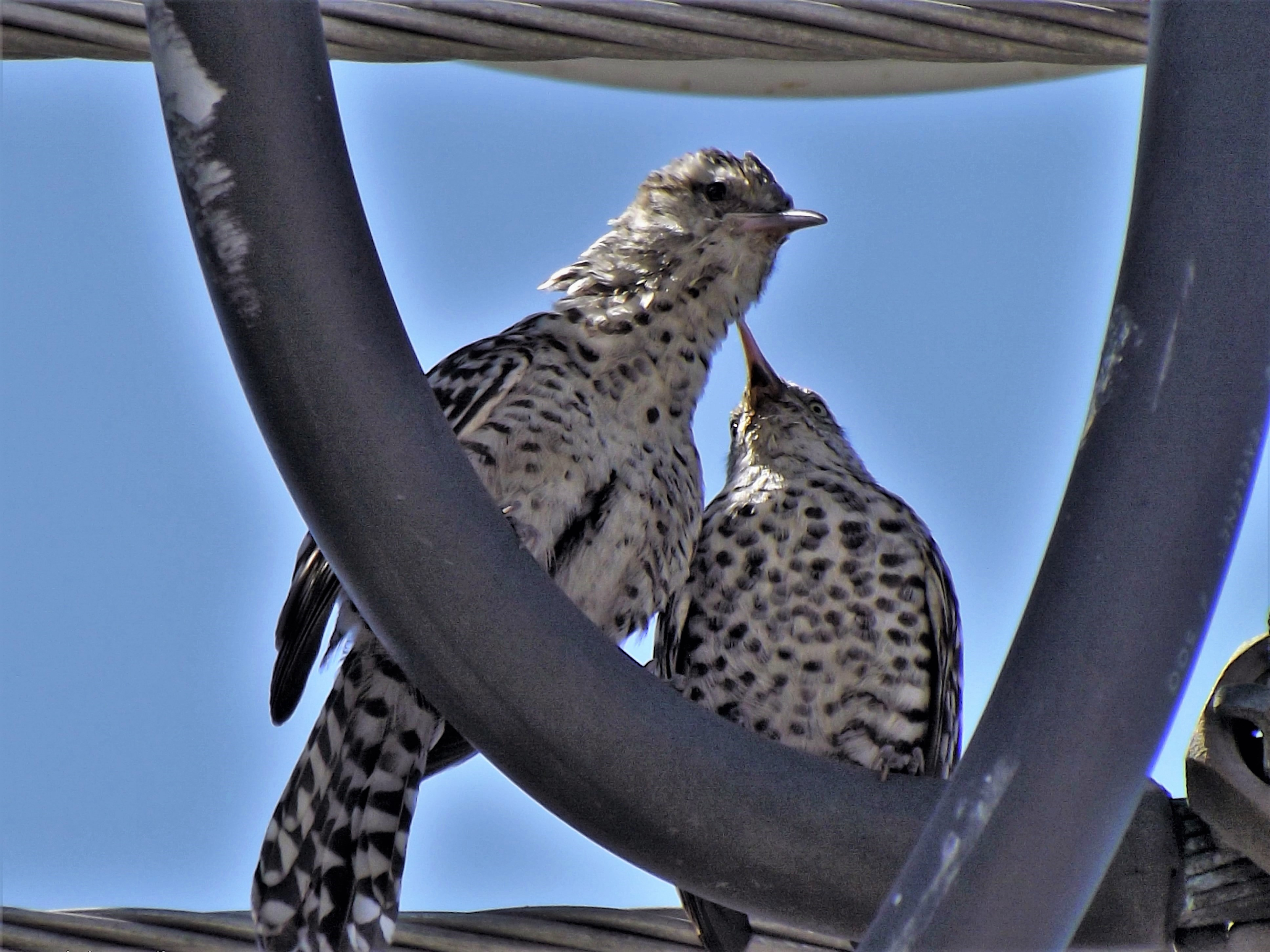 Una pareja de Cucarachero chocorocoy en un poste de alumbrado público en Maracay - Venezuela